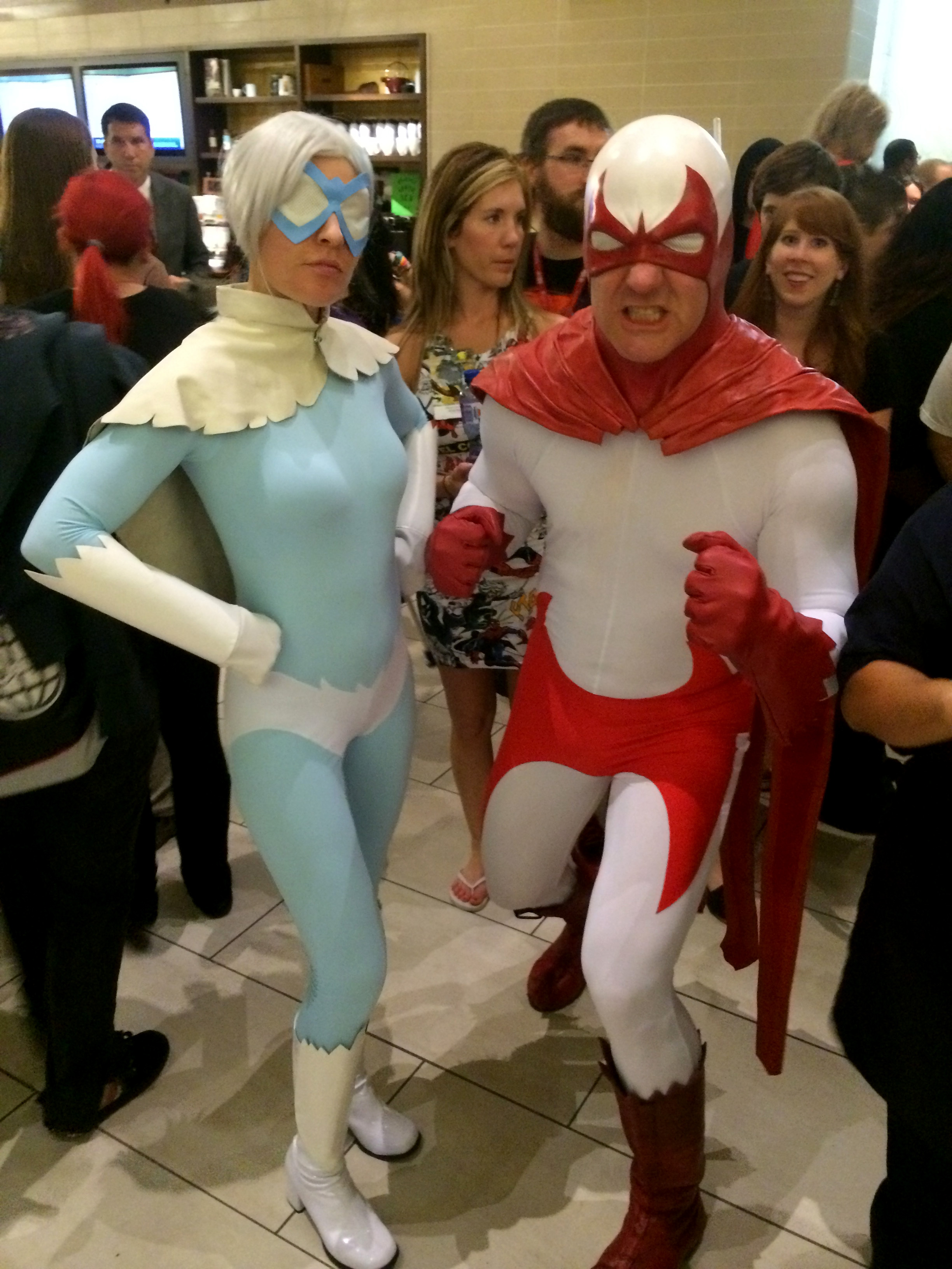 Cosplay at Dragon Con 2014.